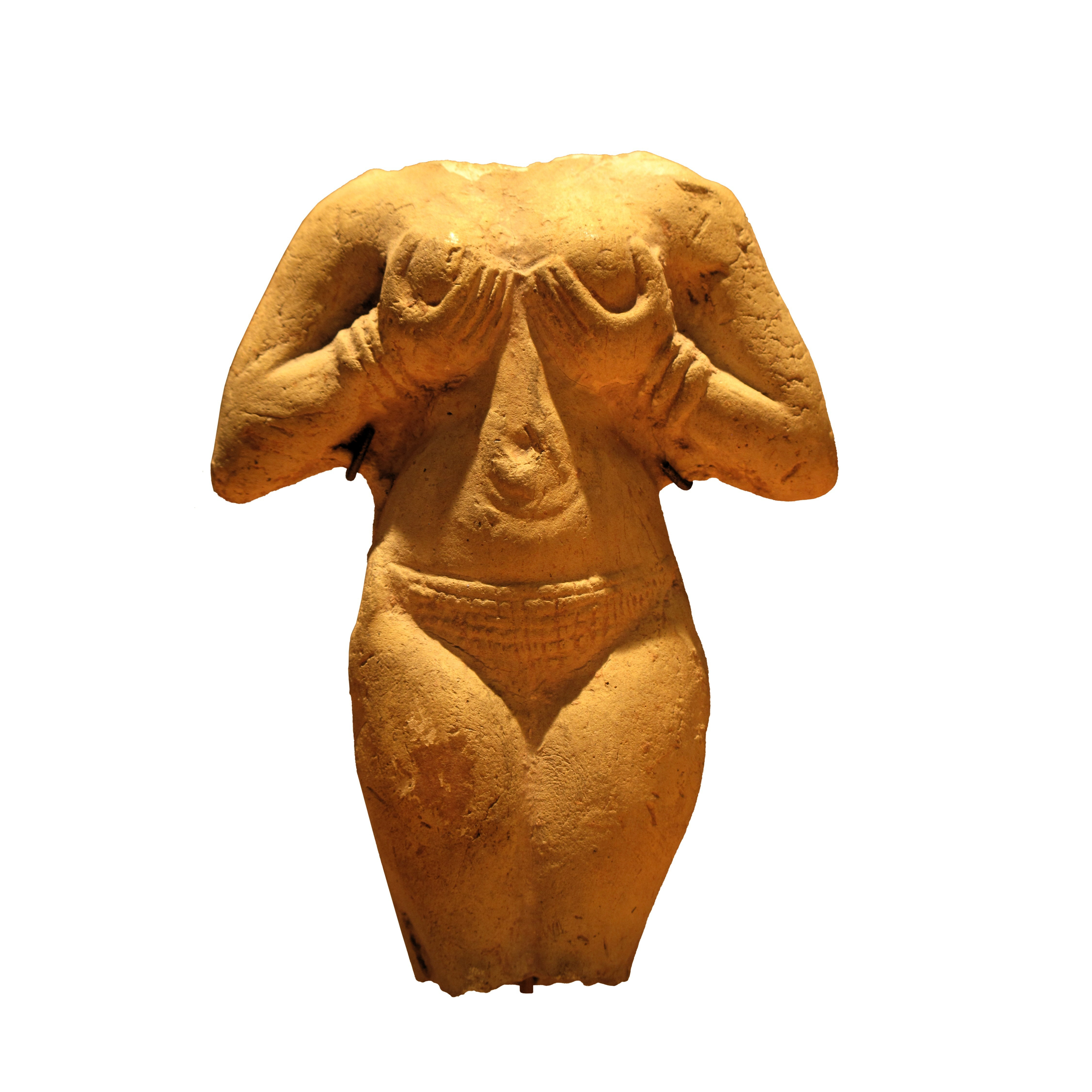 Female statuette, Suse.